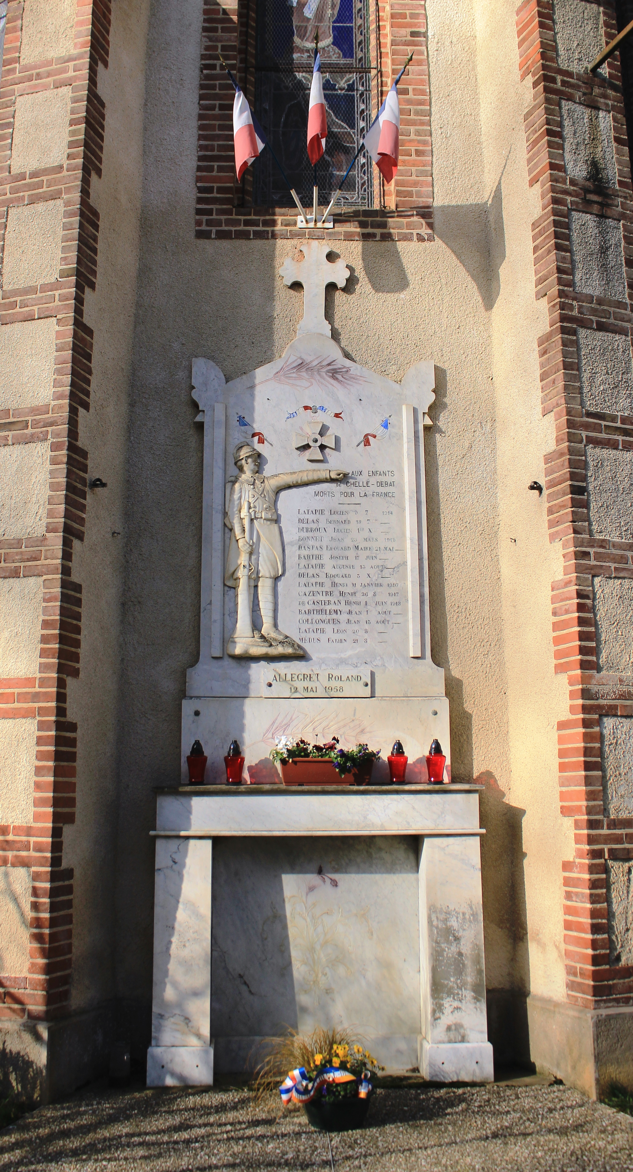 Monument aux morts de Chelle-Debat (Hautes-Pyrénées)